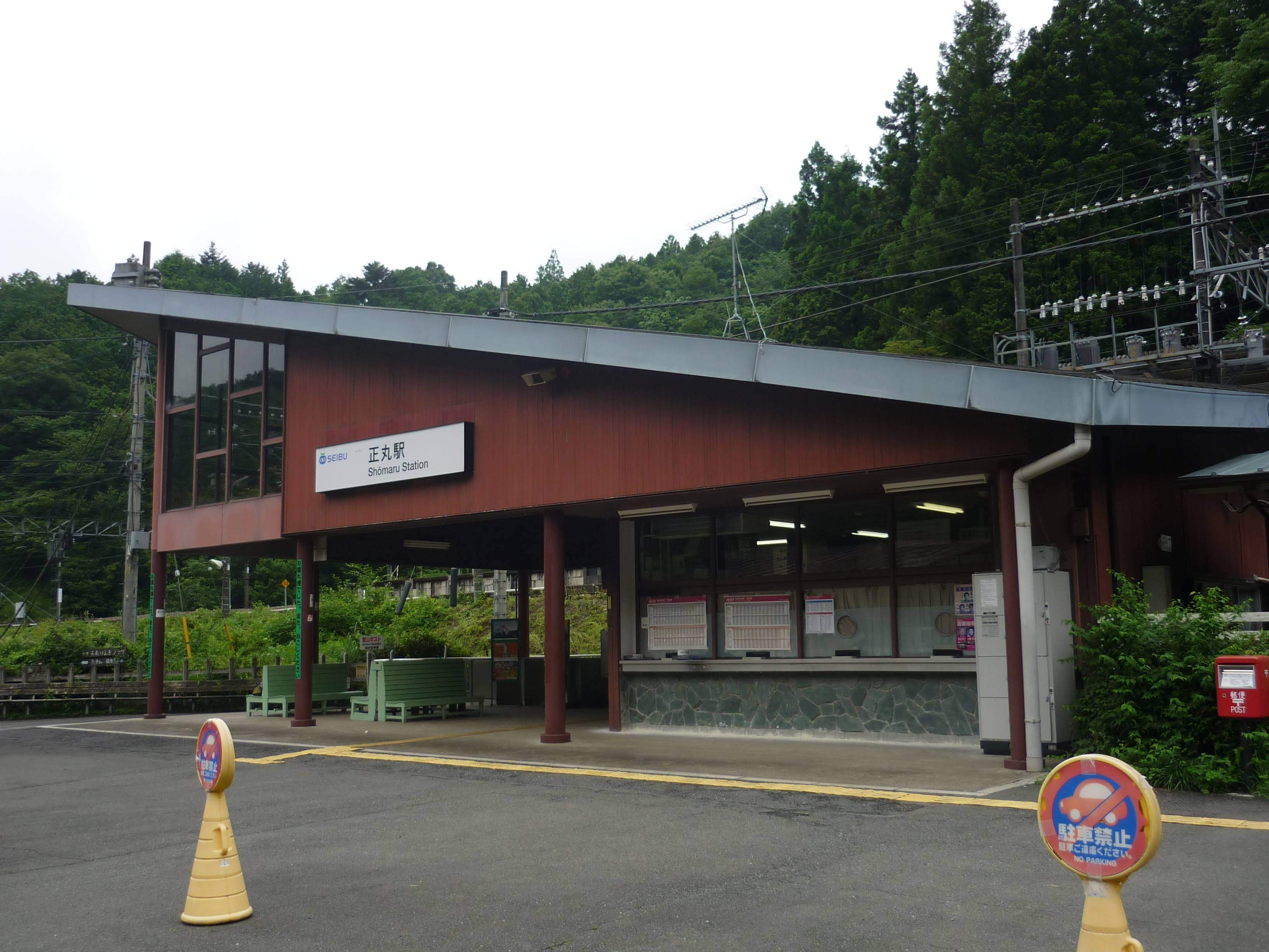 正丸駅駅舎